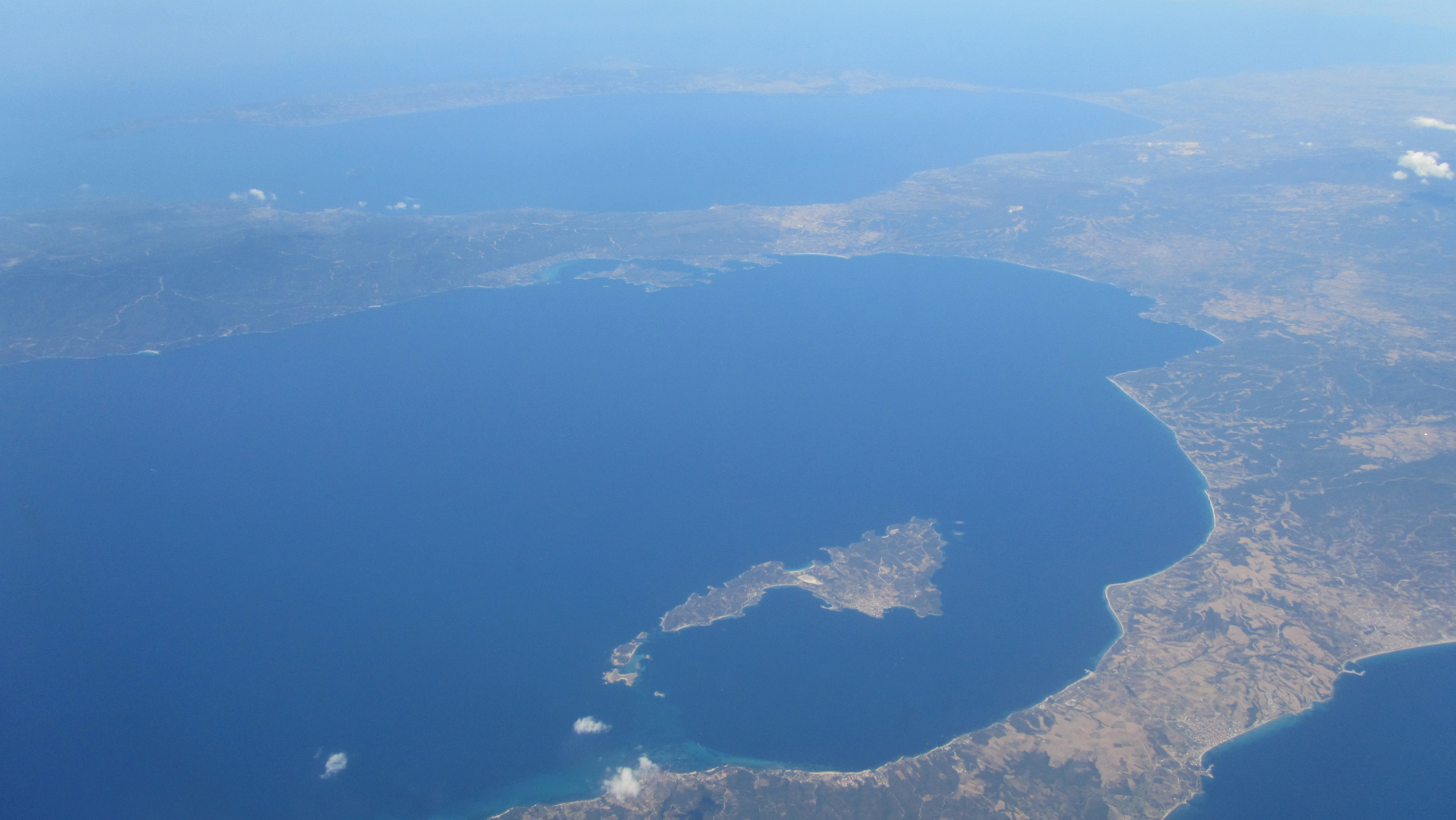 Άγιον Όρος + Αμουλιανή